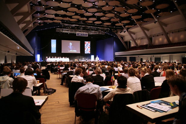 Delegierte der OLMUN in der Oldenburger Weser-Ems-Halle, 2010